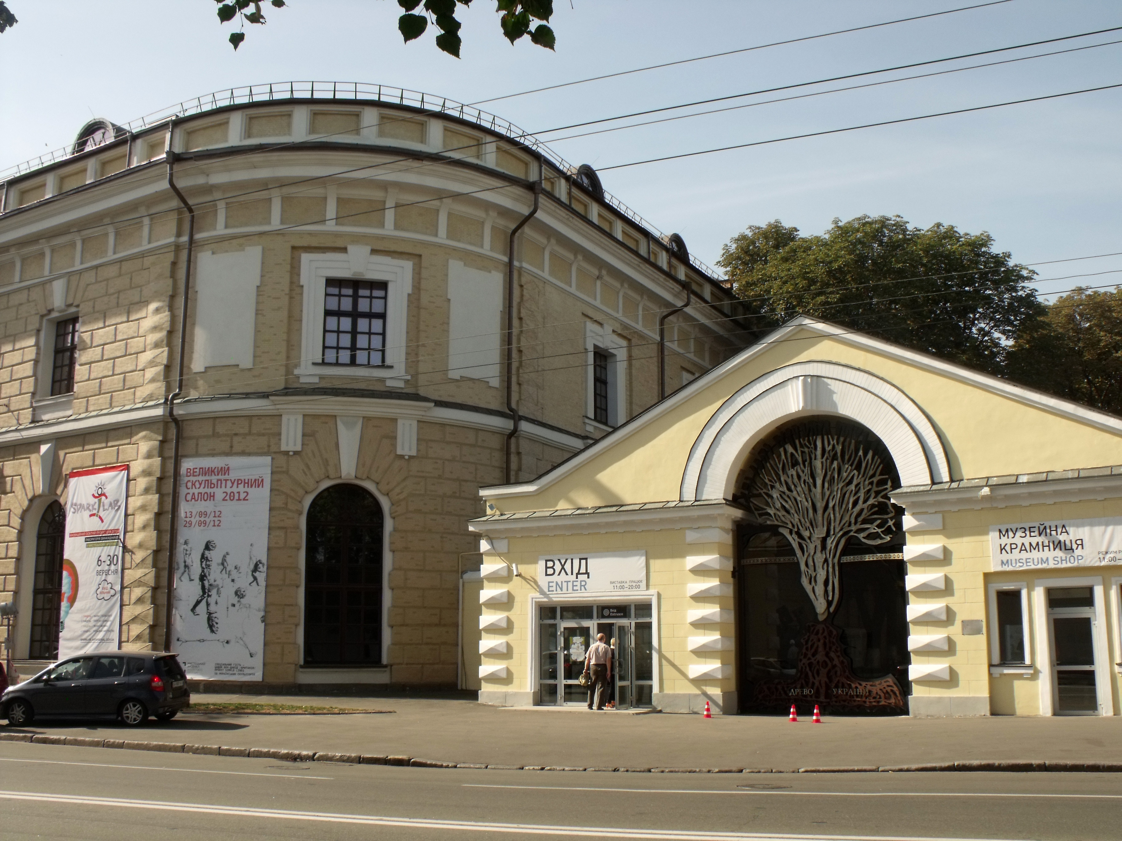 Арсенал старий, де працював Андрієвич Я., декабрист